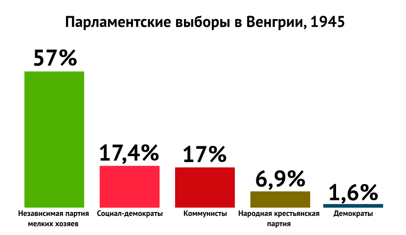 Results of Parlametary elections in Hungary (1945)